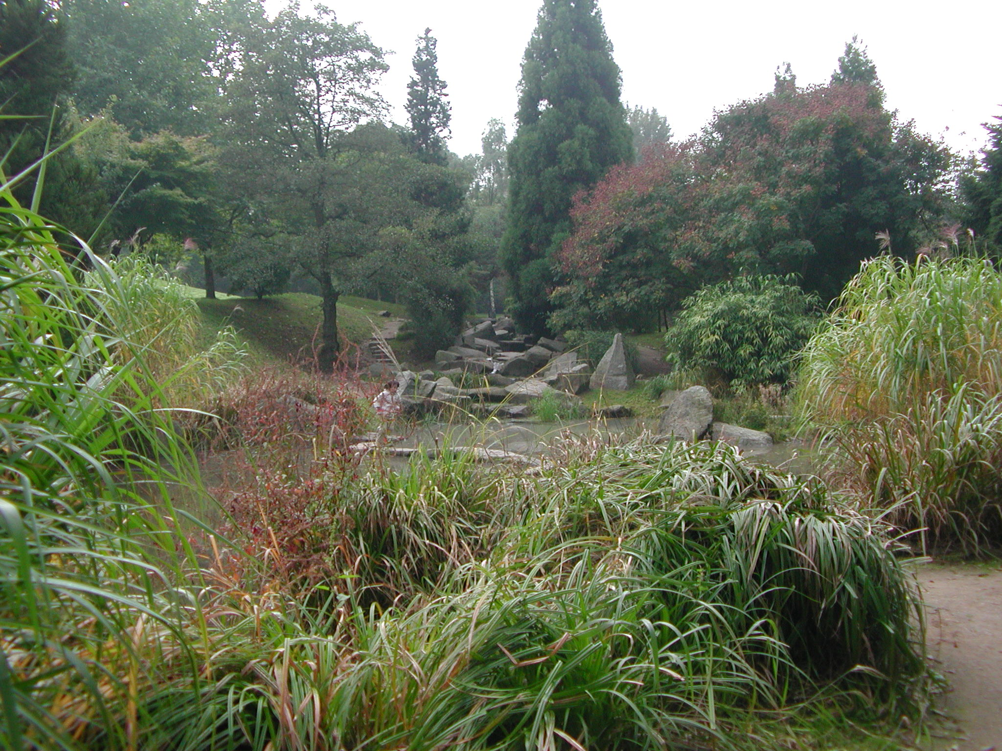 Japanischer Garten im Moerser Freizeitpark